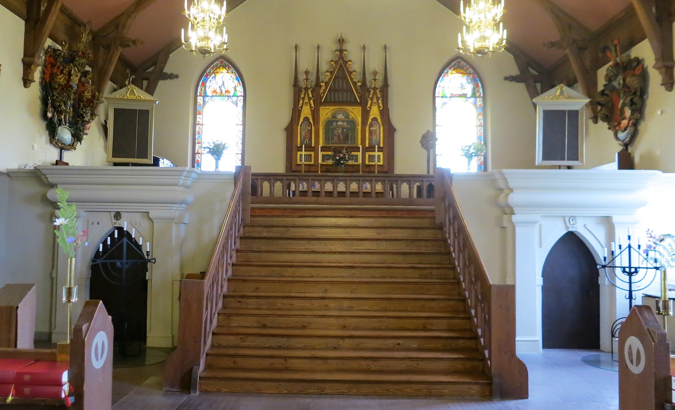 Källeryds kyrka, Växjö stift i Småland